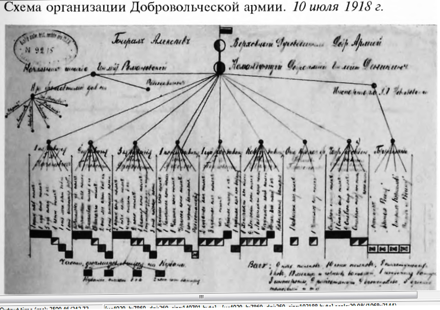 Схема организации Добровольческой армии, составленная 10 июля 1918 года